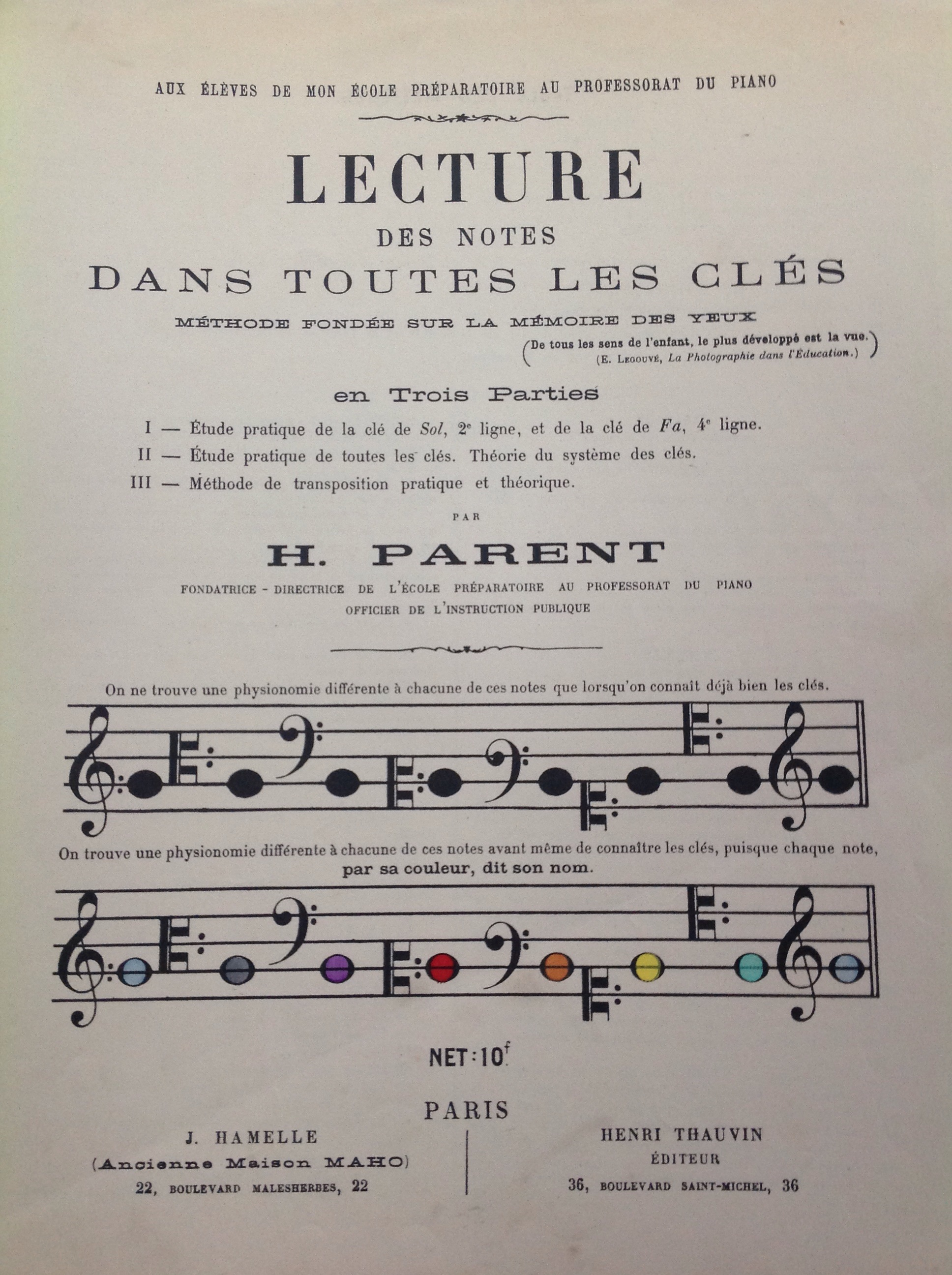 Page de titre de Lecture des Notes de Hortense Parent